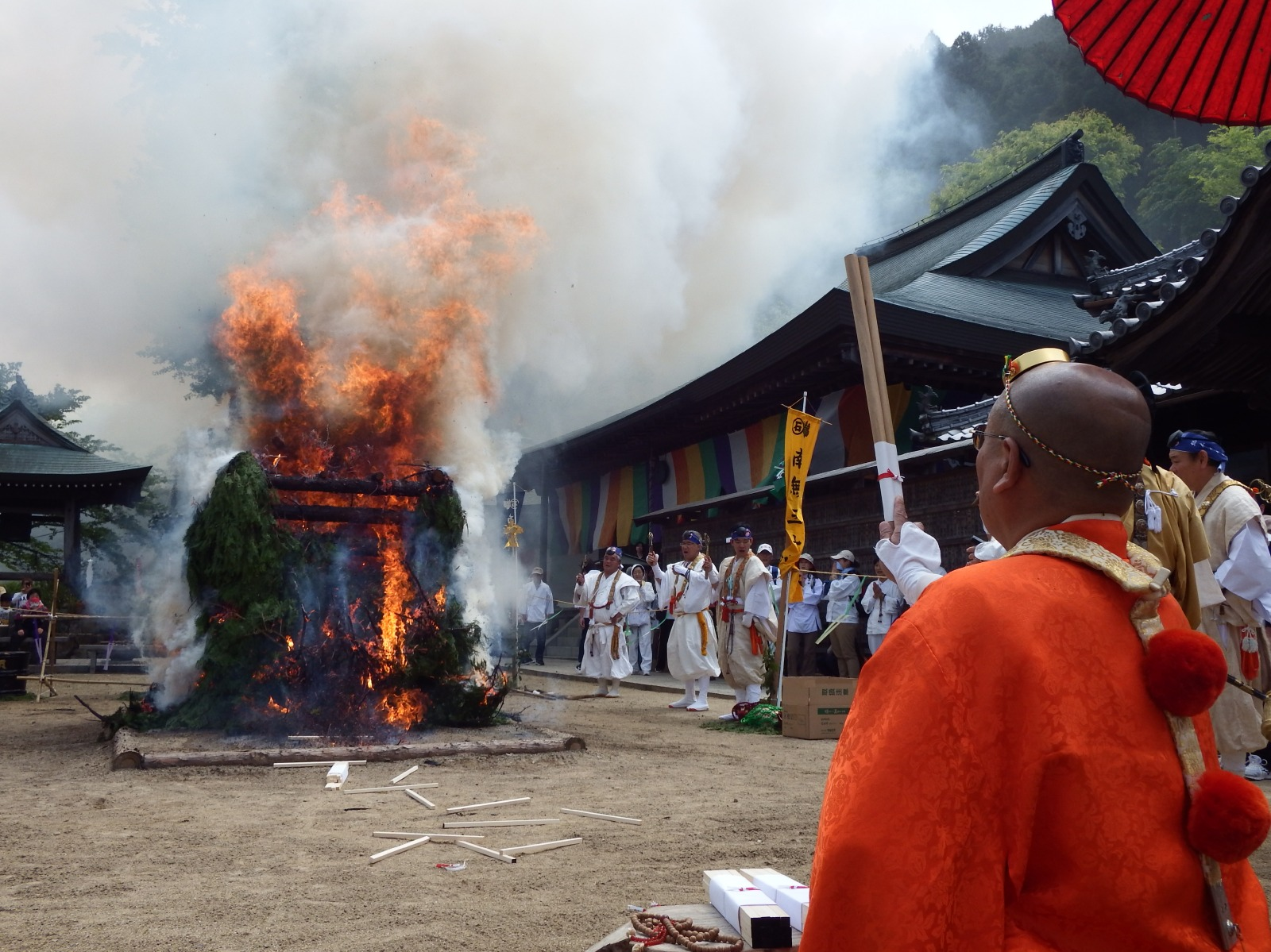 石鎚山極楽寺